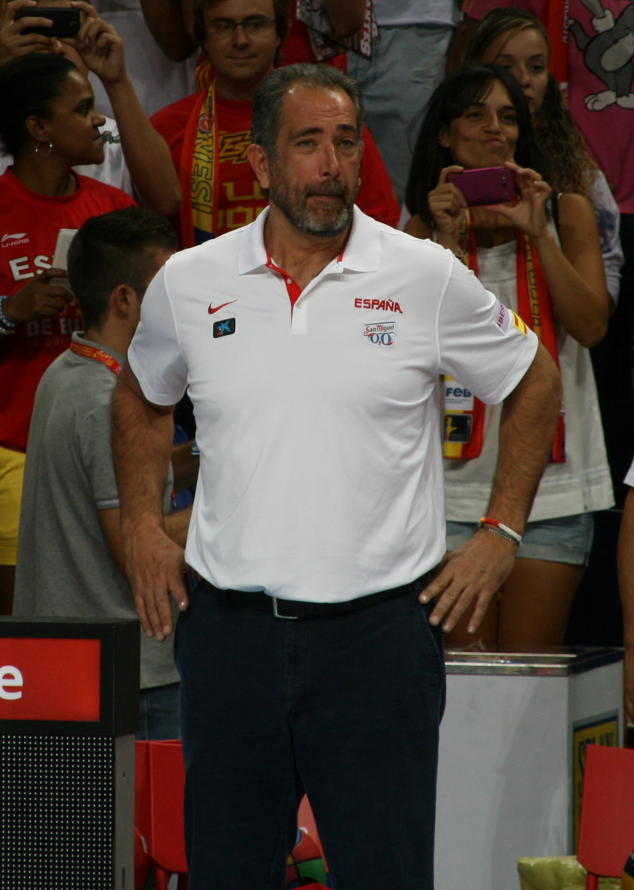 Juan Antonio Orenga durante el previo del partido